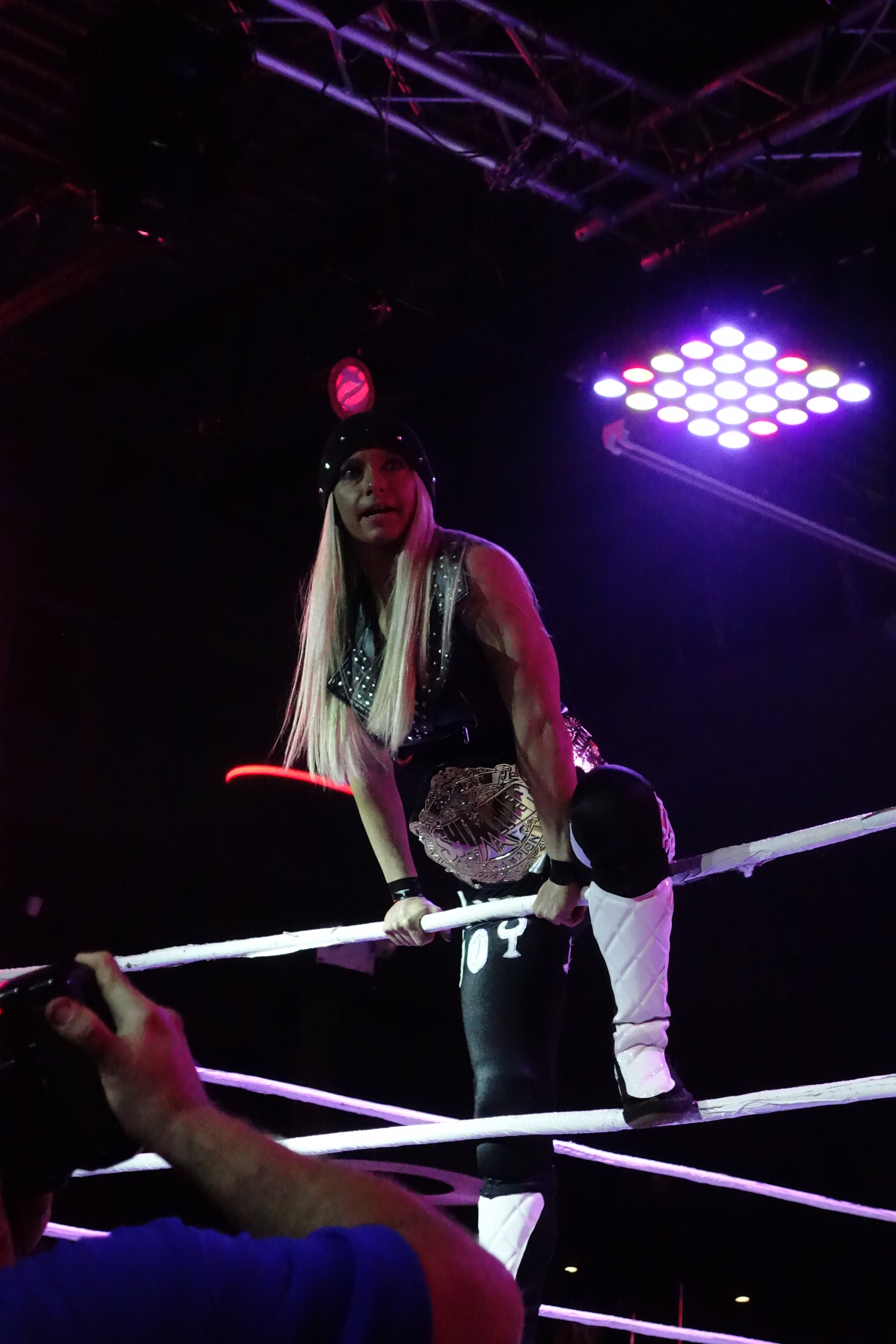 Dust posant avec la ceinture de championne Heart of Shimmer.